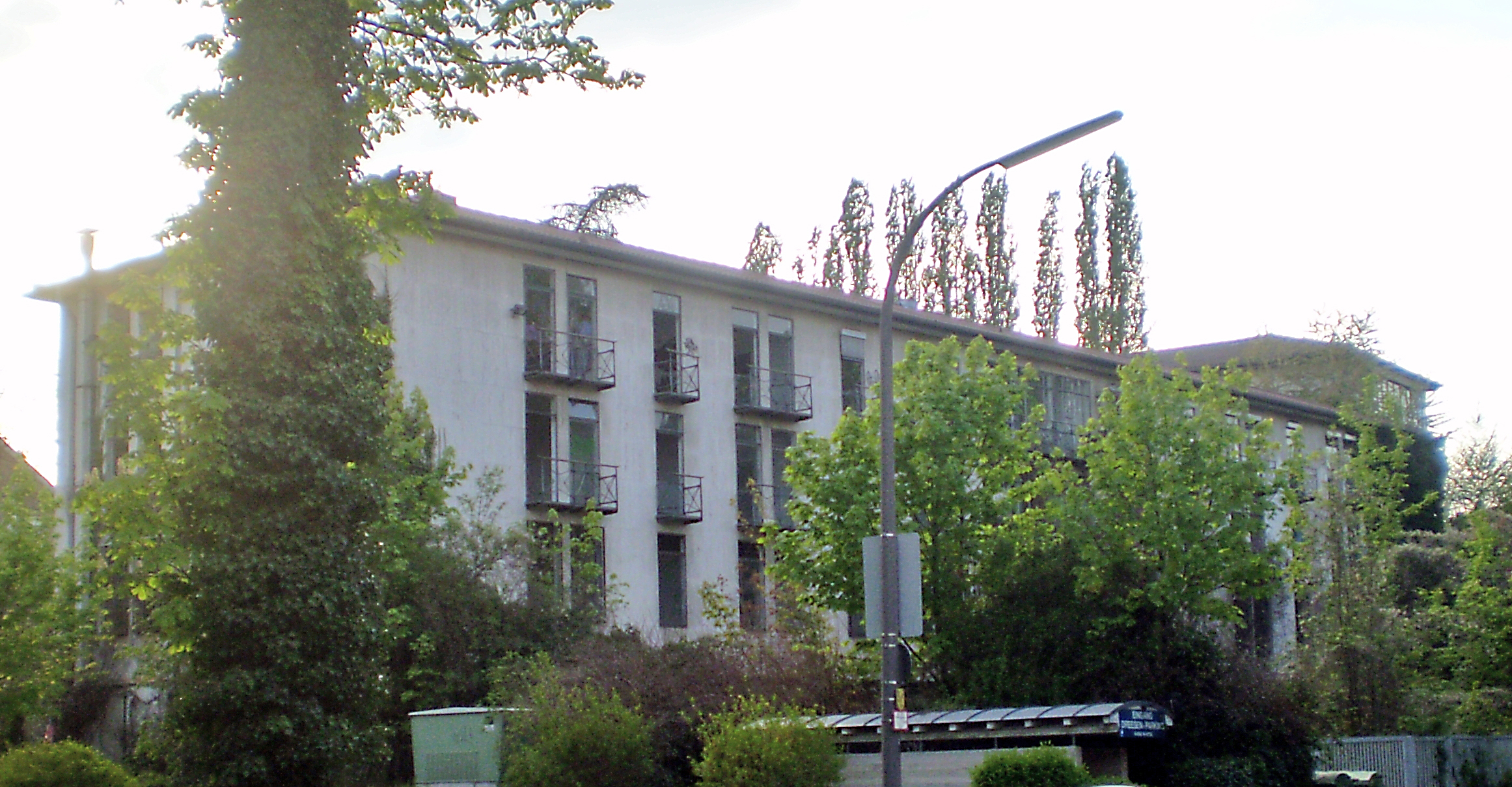 Ehemalige französische Botschaft (2012 abgebrochen) in Rüngsdorf, Bad Godesberg: Ansicht von der Rheinstraße